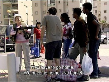 הסרט דרפור מאת, בבימויים ובכיכובם של יוסי עטיה ואיתמר רוז